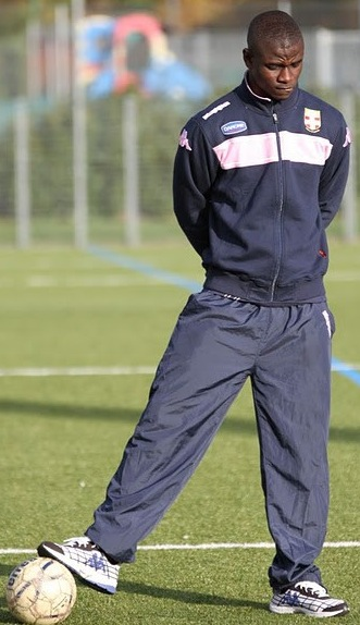 Jonathan Mensah lors de mini-stage organisé pour des jeunes par son club d'evian TG FC